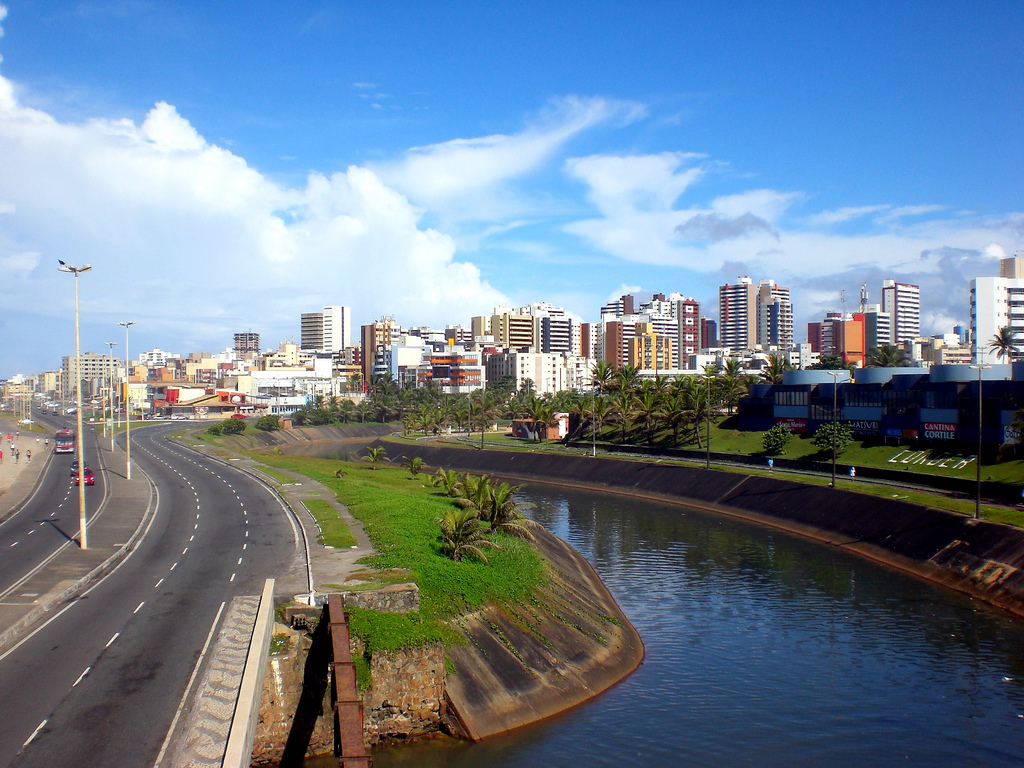 Pituba e o Parque Costa Azul - Salvador - Brasil.